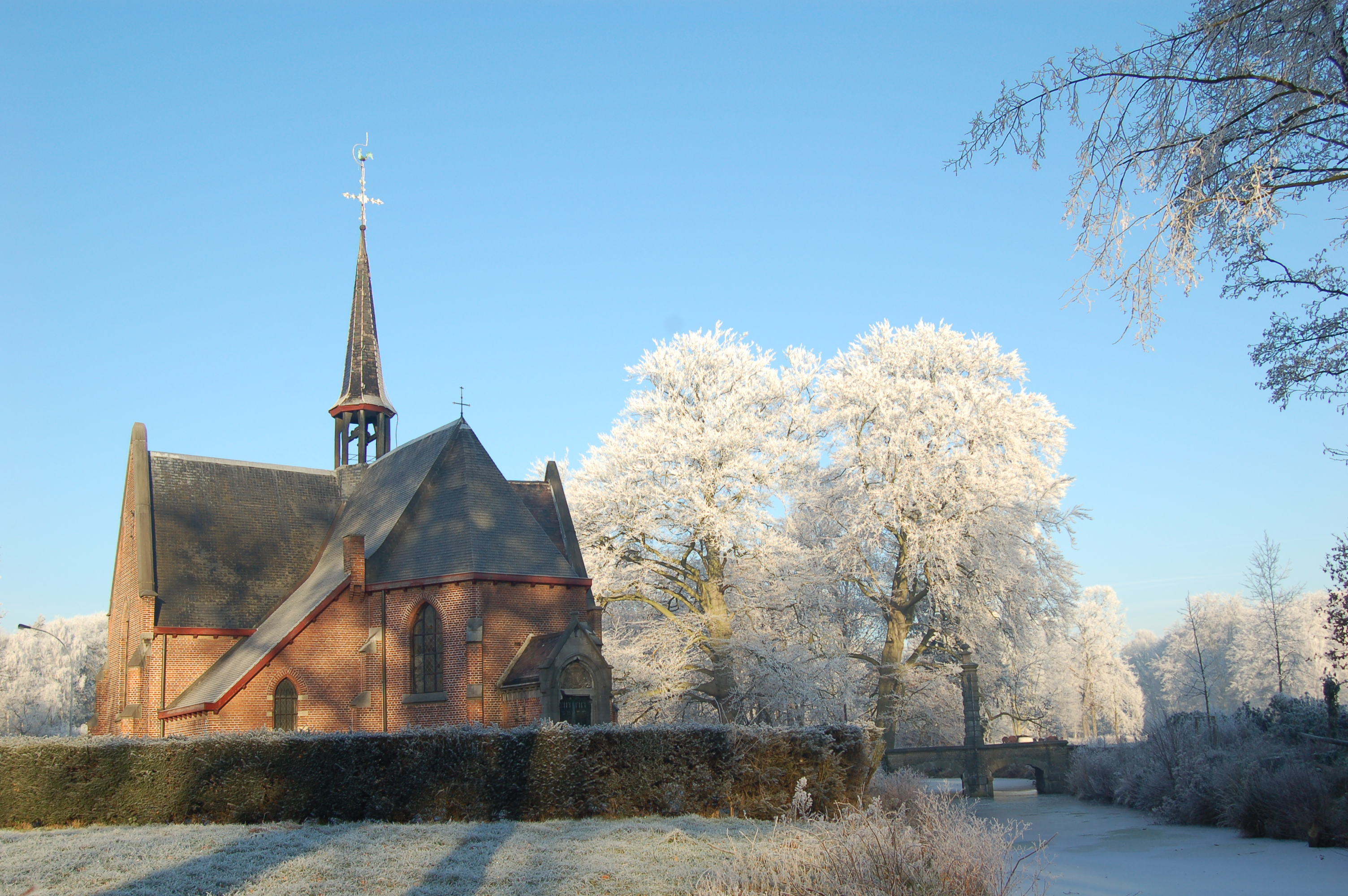 Kapel van de Horst, toegewijd aan O.-L.-Vrouw (5). Oude bedevaartplaats . reeds bekend in XV . gelegen aan de rand van omhaagd en beboomd domein Vordenstein.